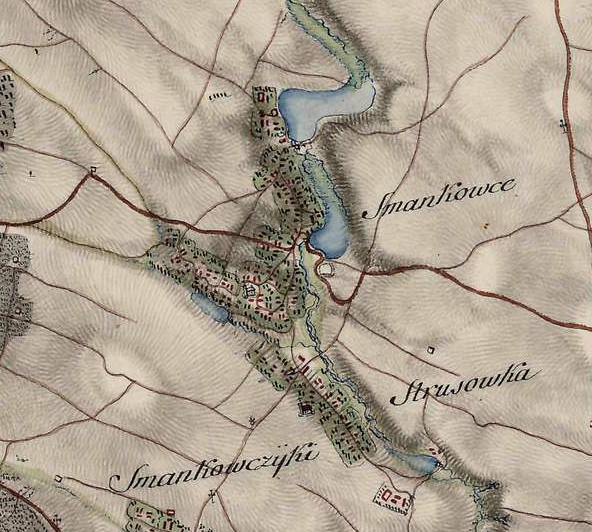 Чортків та околиці на мапі фон Міґа, XVIII ст.